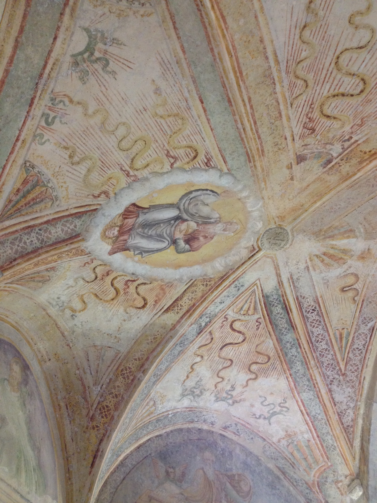 chiesa di San Lorenzino, Orco (SV) Italy